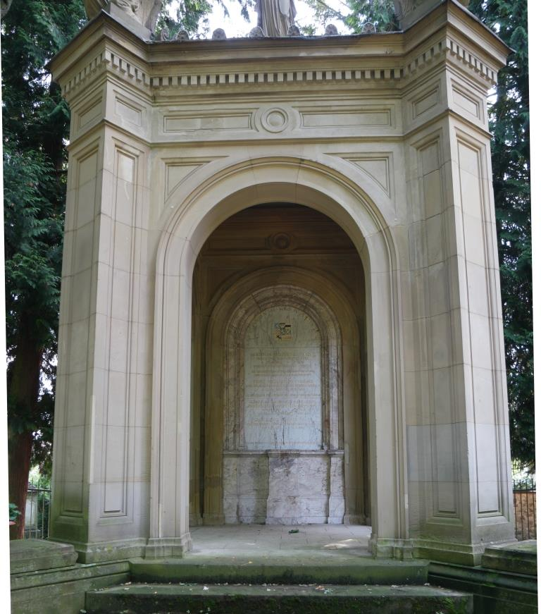 Grabmal des Generals und Politikers Prinz Nikolaus Wilhelm zu Nassau, 1832-1905, auf dem Alten Friedhof in Wiesbaden